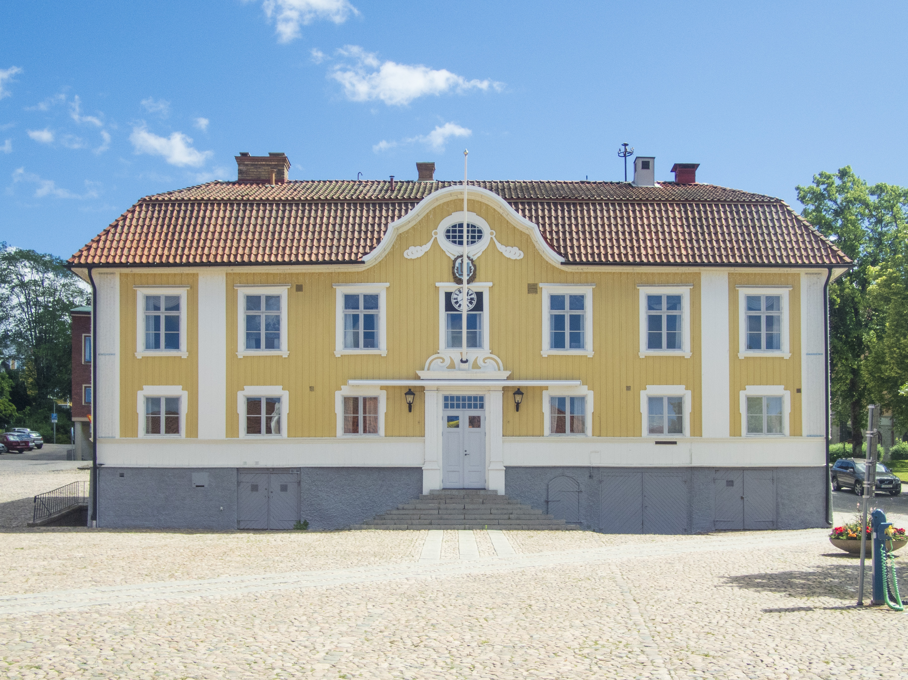 Ulricehamns rådhus. Byggnaden fungerade som rådhus mellan 1790 - 1947. Byggnadsår 1789-1790. Peter Svenson (Byggmästare) Thure Wennberg (Arkitekt). Ombyggt till nuvarande utseende 1904. Arkitekt: Lars Kellman